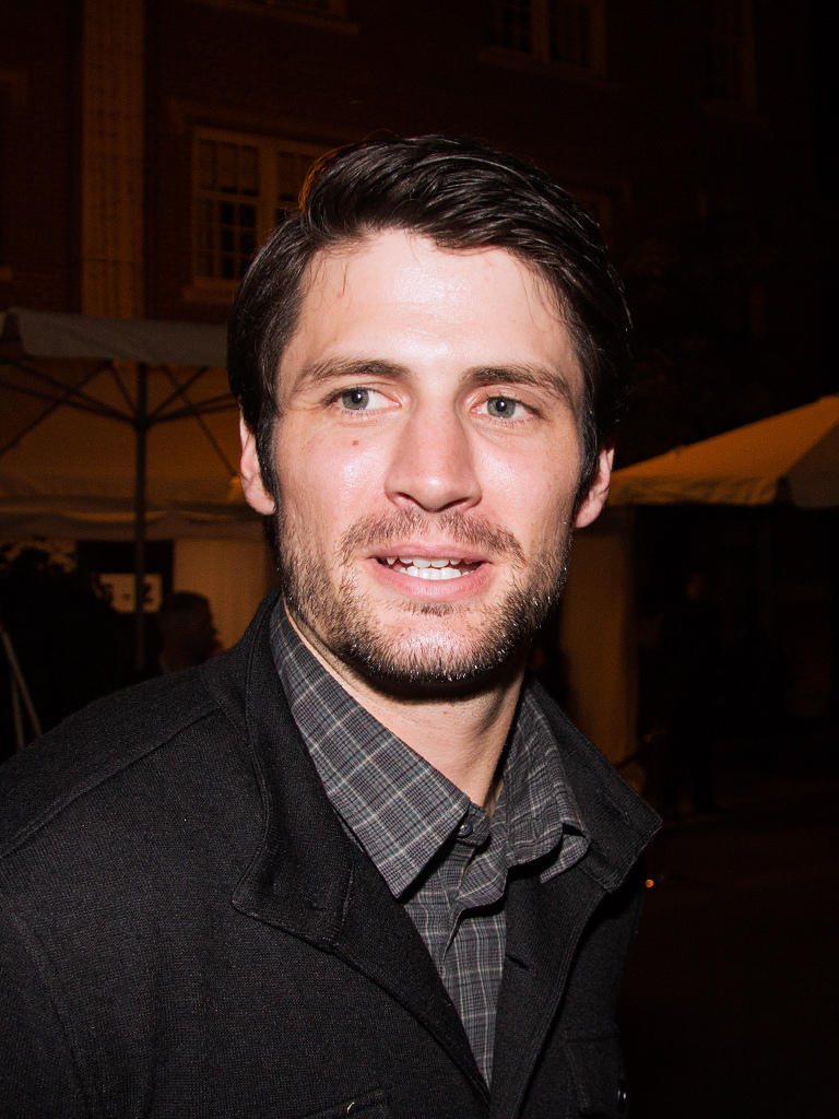 Toronto International Film Festival 2013